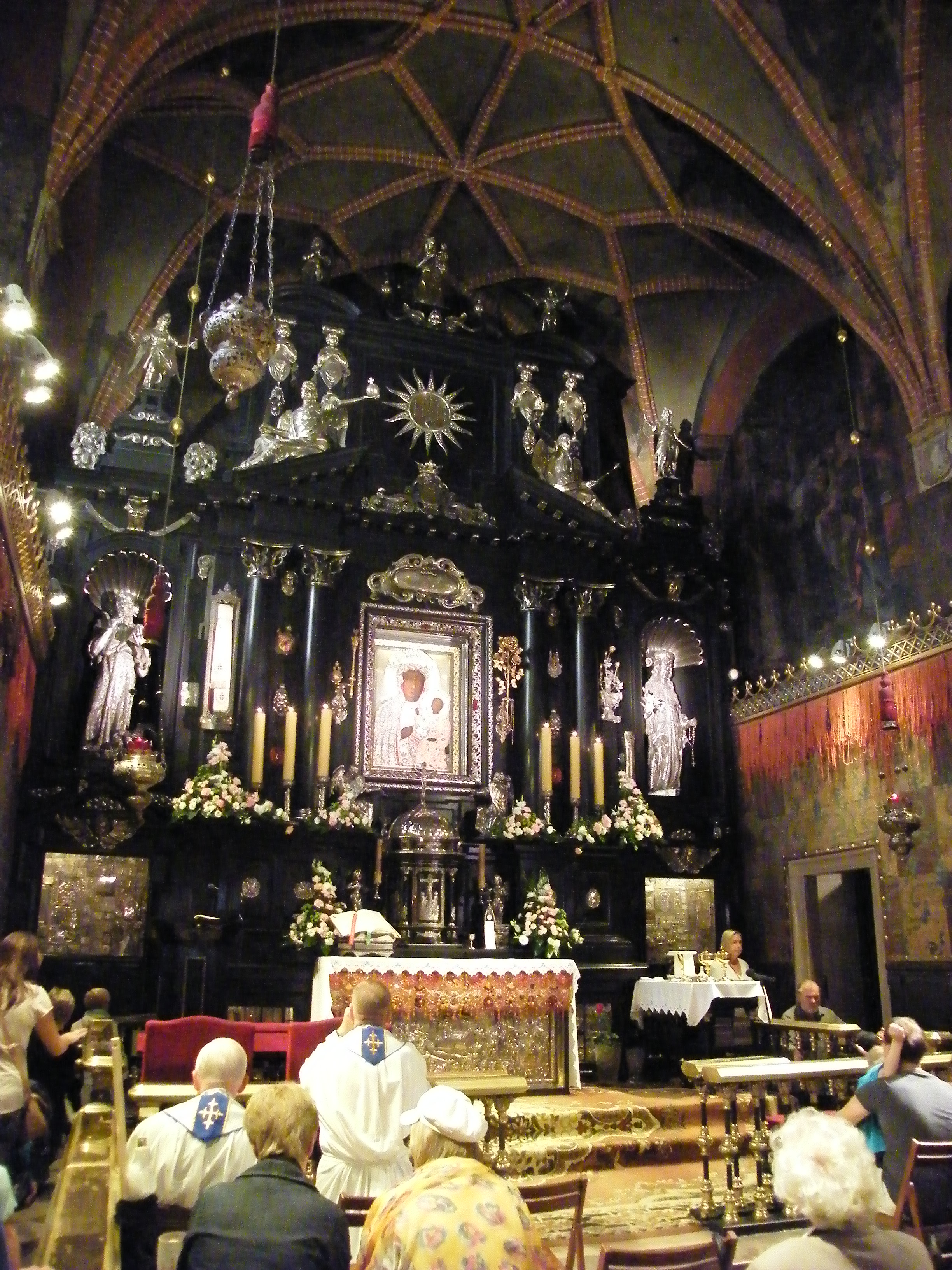 Częstochowa, kaplica pw. NMP, 1430-1460, 1518-1523, 1640-1660, 1930